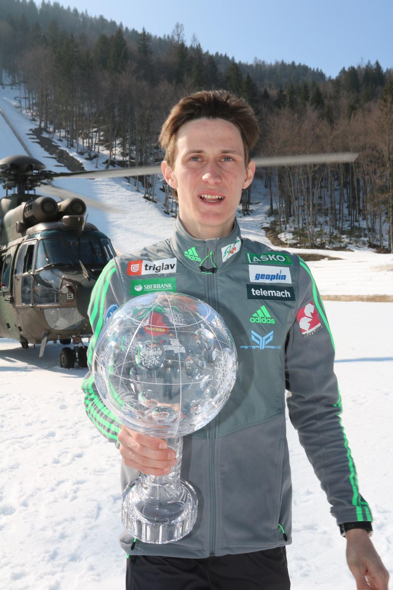 Slovenska vojska je tudi letos podprla Smučarsko zvezo Slovenije pri izvedbi zaključka svetovnega pokala v smučarskih poletih v Planici.